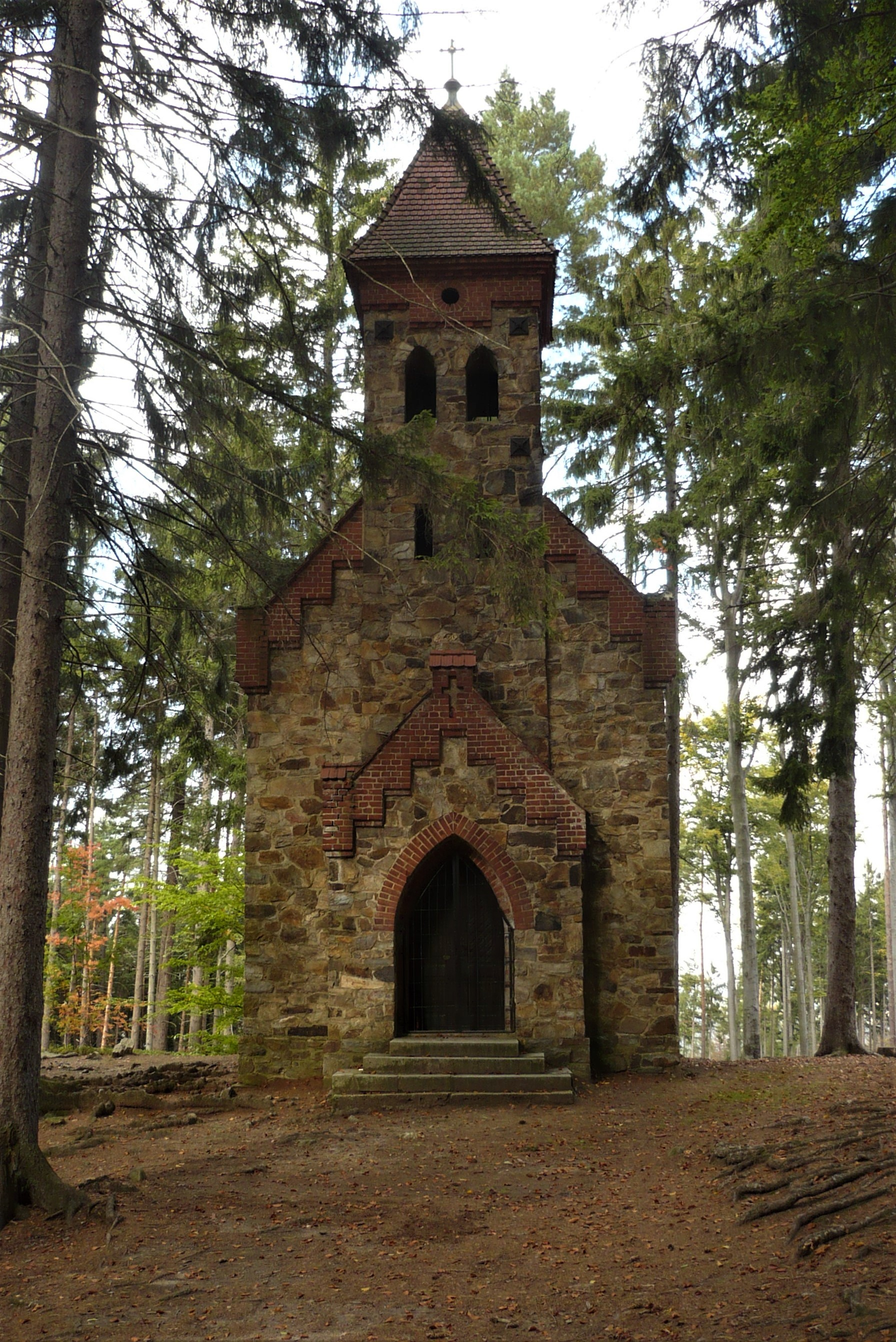 Kościół pw. św. Anny na Parkowej Gorze